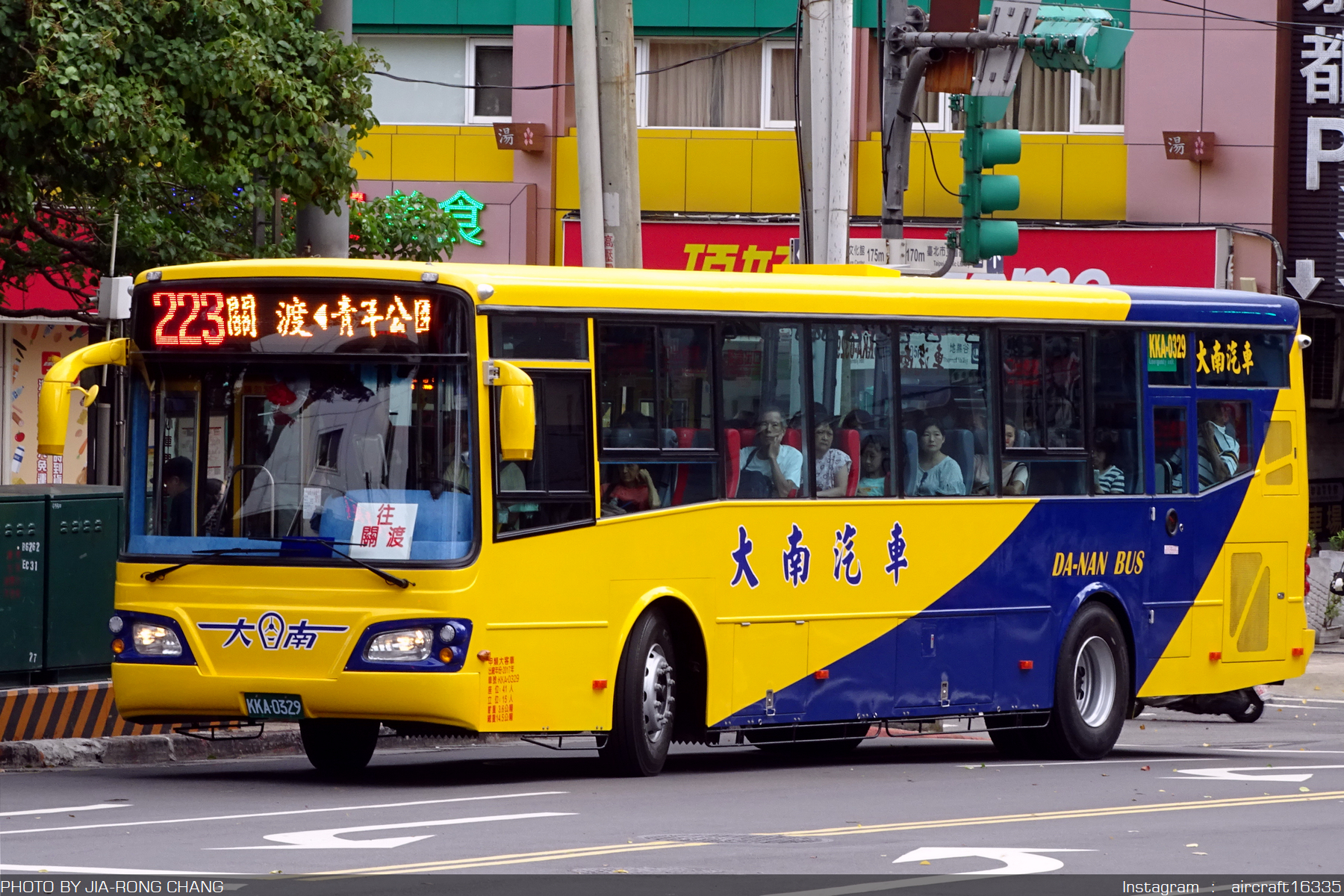 HINO - RK8JRVA - KKA-0329